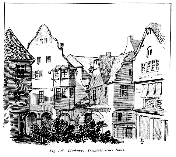 Trombetta-Komplex Anfang des 20. Jahrhunderts.